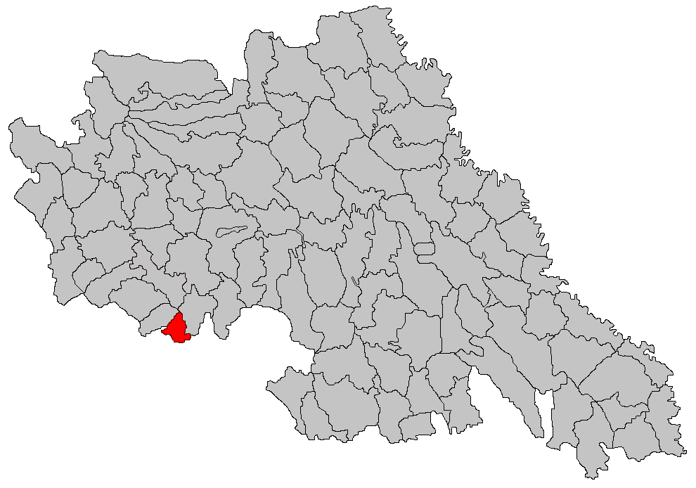 Categorie:Hărţi ale judeţului Iaşi